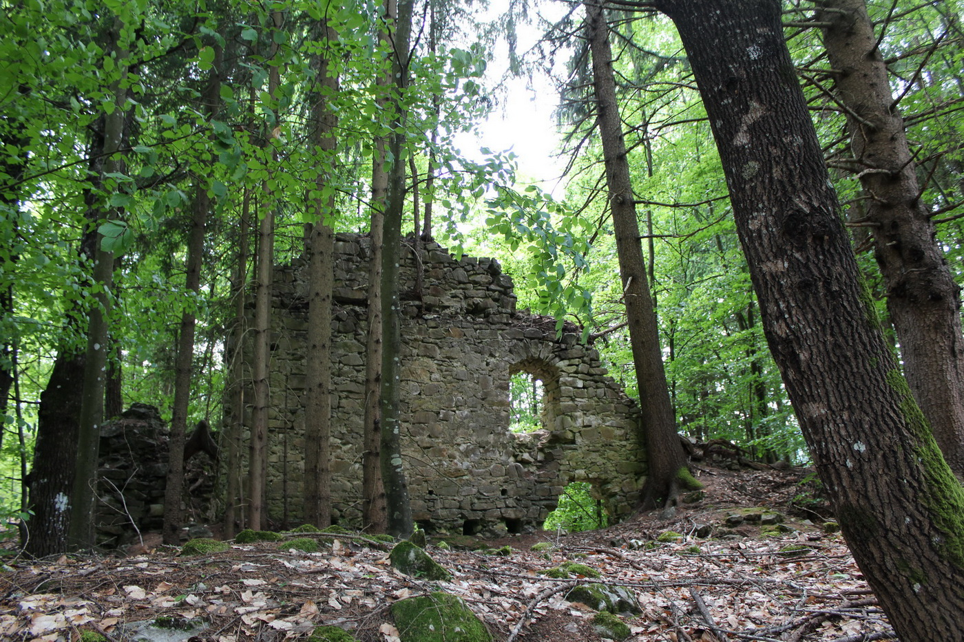 Reste des Palas der Burg Treffen (Kärnten). Die Gründung der Burg erfolgte um 1065 durch Graf Markwart v. Eppenstein. Die Grafen und Kärntner Herzöge von Eppenstein gehörten zu jener Zeit zu den mächtigsten Dynastien im südöstlichen Alpenraum. Um 1090 geht die Burg und weitere Eppensteiner Besitzungen durch eine Heirat an den Grafen Wolfrad aus dem schwäbischen Dynastengeschlecht der Grafen von Veringen. Ab 1121 trat er als Graf „von Treffen“ auf.